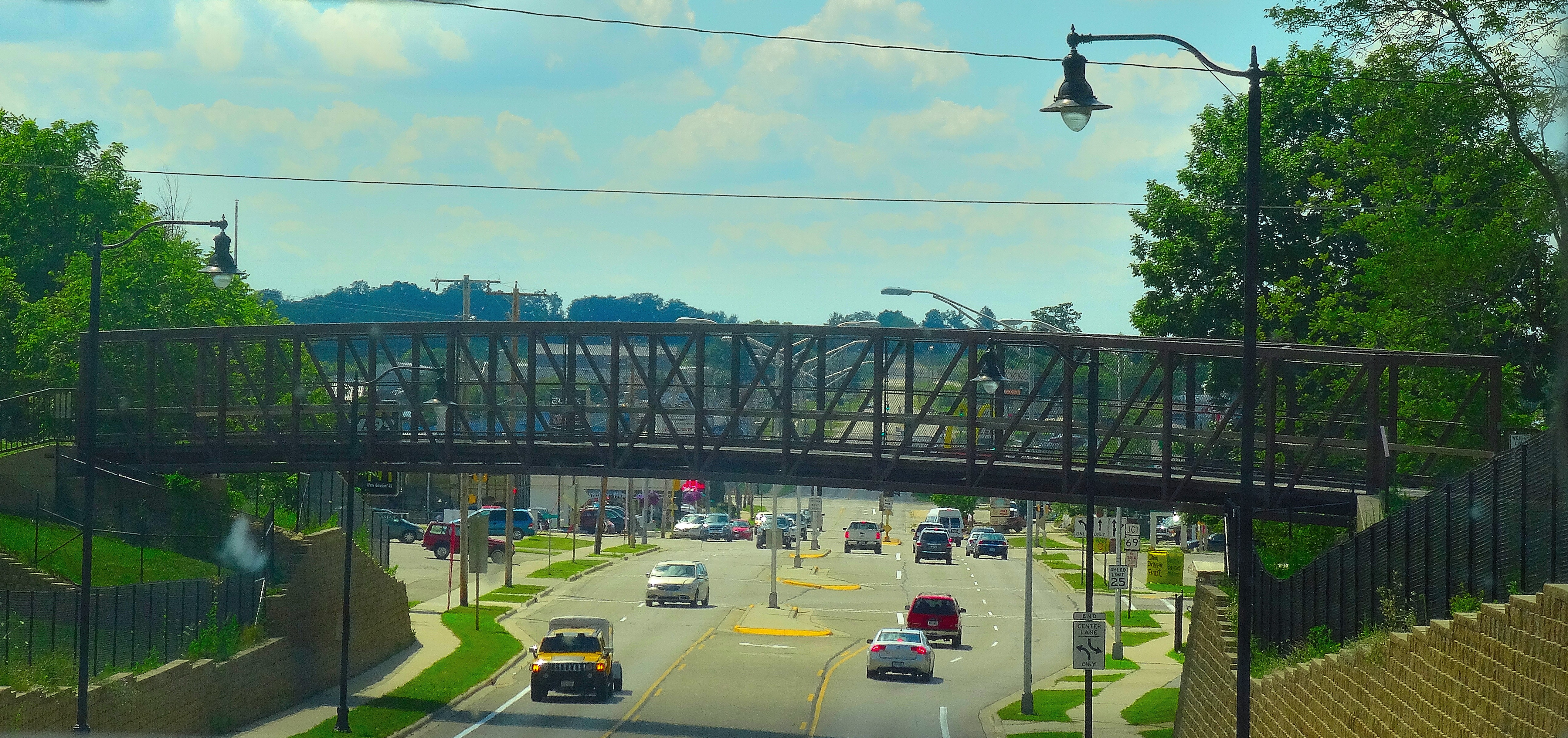 Badger State Trail Overpass